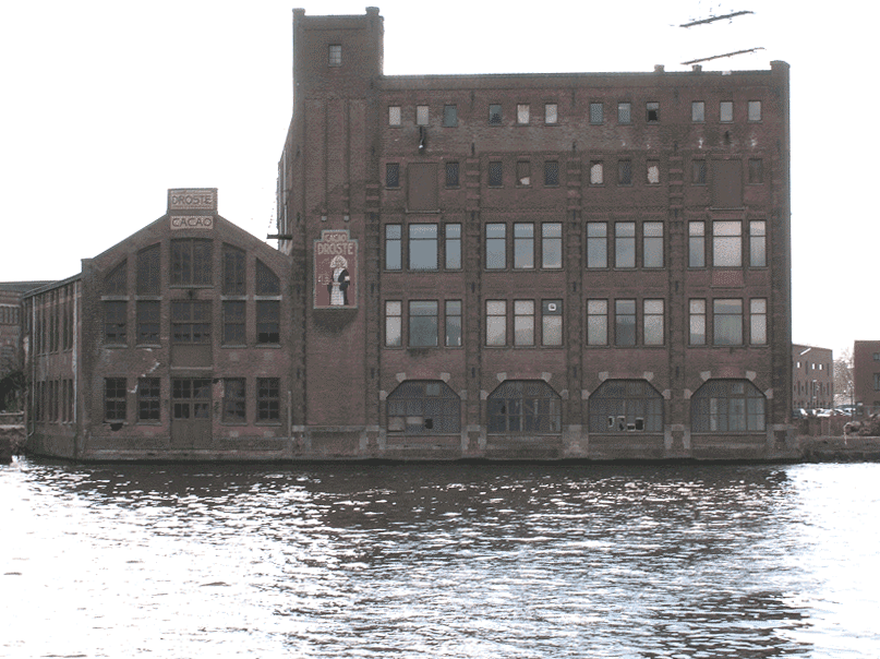 eigen foto van Drostefabriek in Haarlem